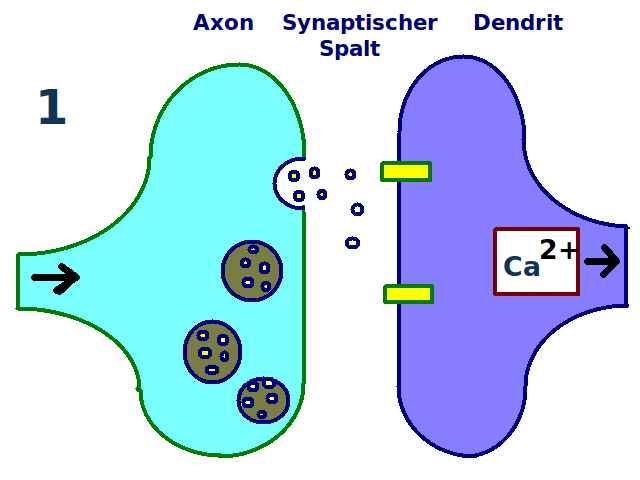 Langzeit-Potenzierung Erste Stufe